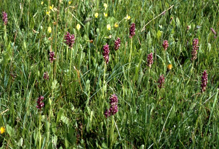 Wanzen-Knabenkraut (Anacamptis coriophora, Syn.: Orchis coriophora), Orchideen (Orchidaceae), natürlicher Standort: frische Wiese auf leicht salzigem Boden / natural habitat: fresh meadow on slightly saline soil - Österreich/Austria/Autriche: Burgenland, Seewinkel, Illmitz